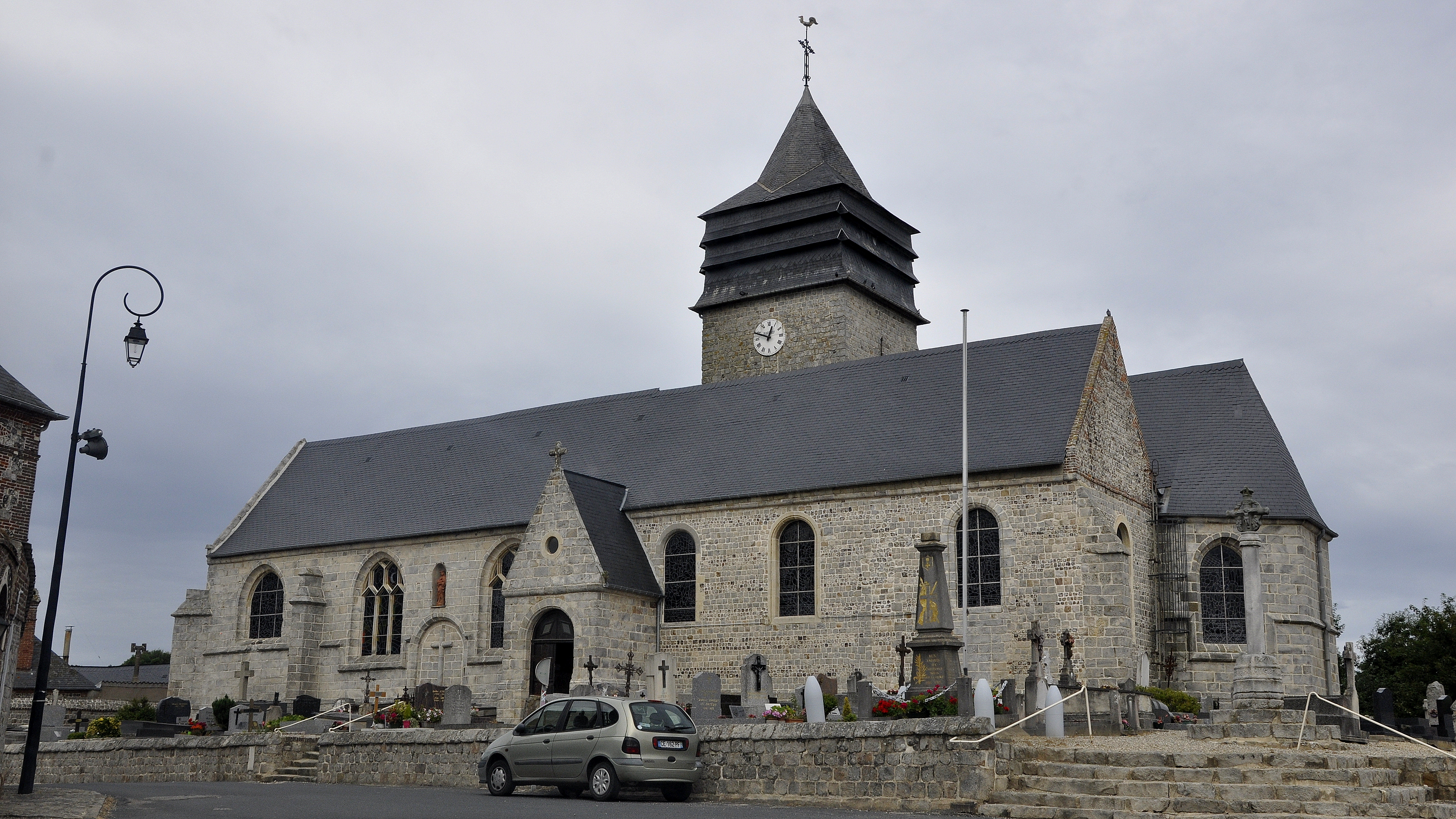 De kerk van Sotteville-sur-Mer, Frankrijk